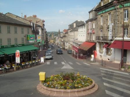 Brive la gaillarde 2007, Avenue Jean Jaurès